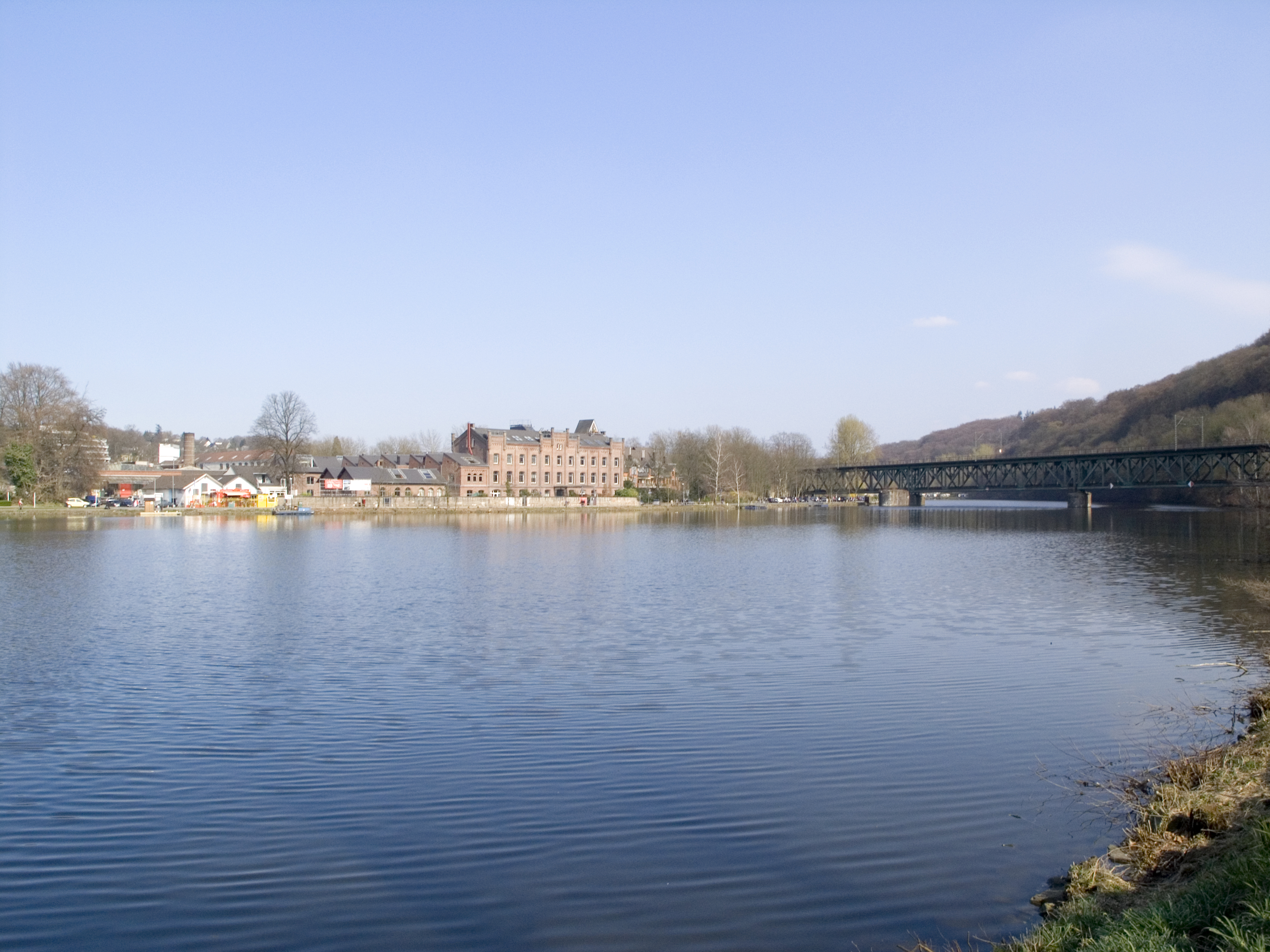 Северный Рейн - Вестфалия, Эссен - водохранилище Кеттвигер Зее